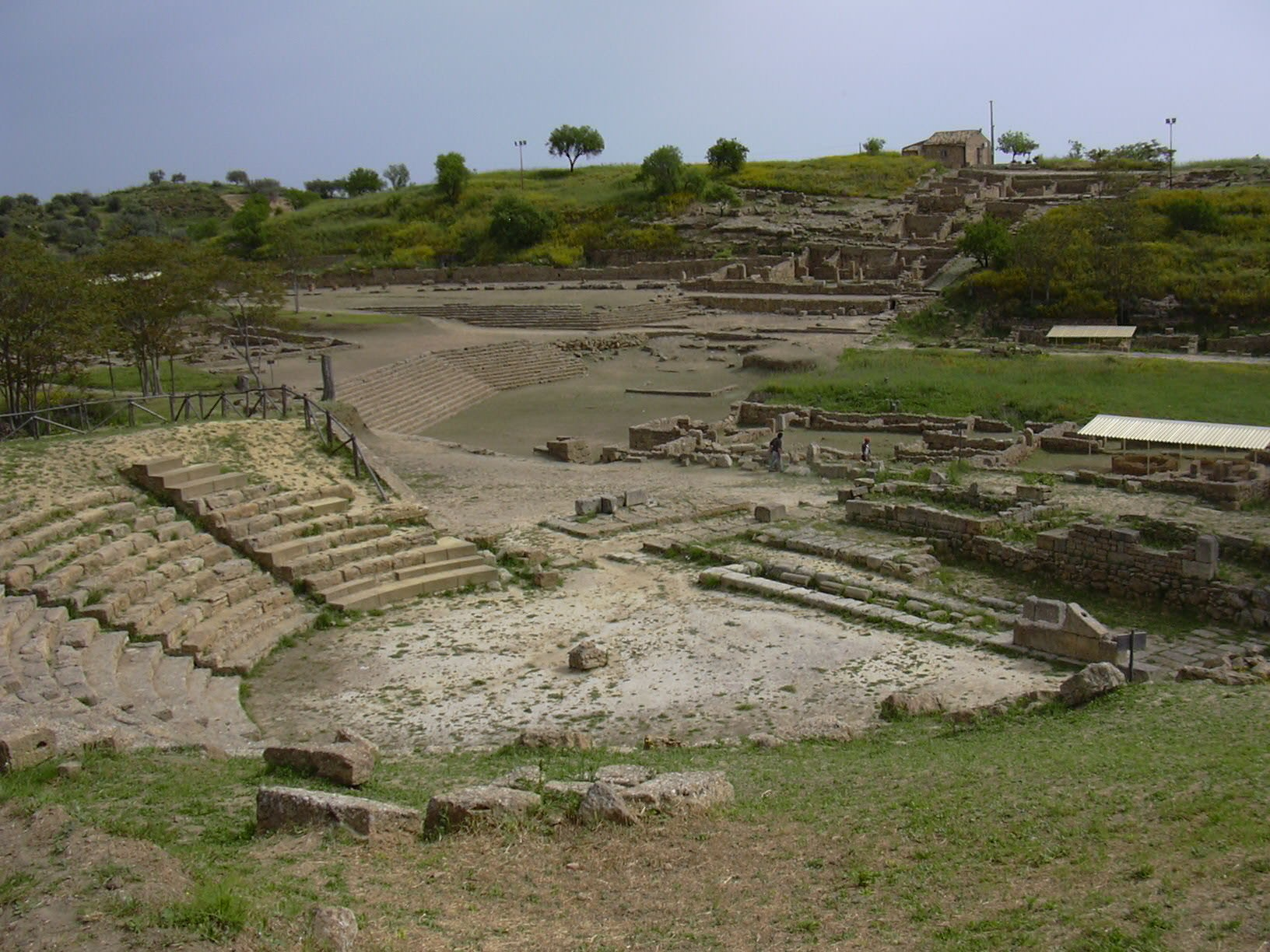 Morgantina- Sicilia: vista del teatro e della sua scena